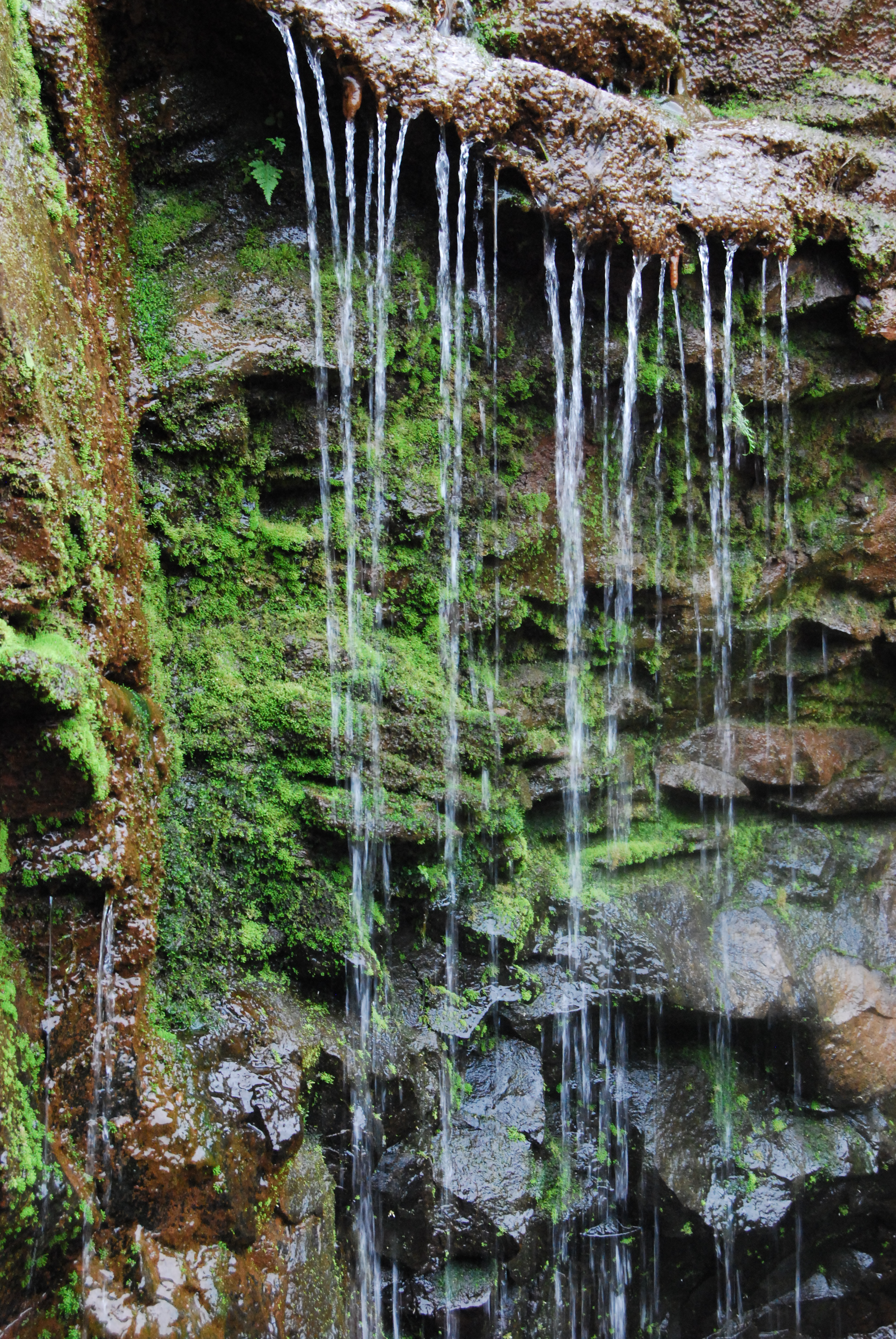 Detalle minas de Wanda Misiones